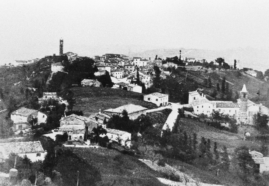 Foto storica di Montescudo. Archivio comunale.